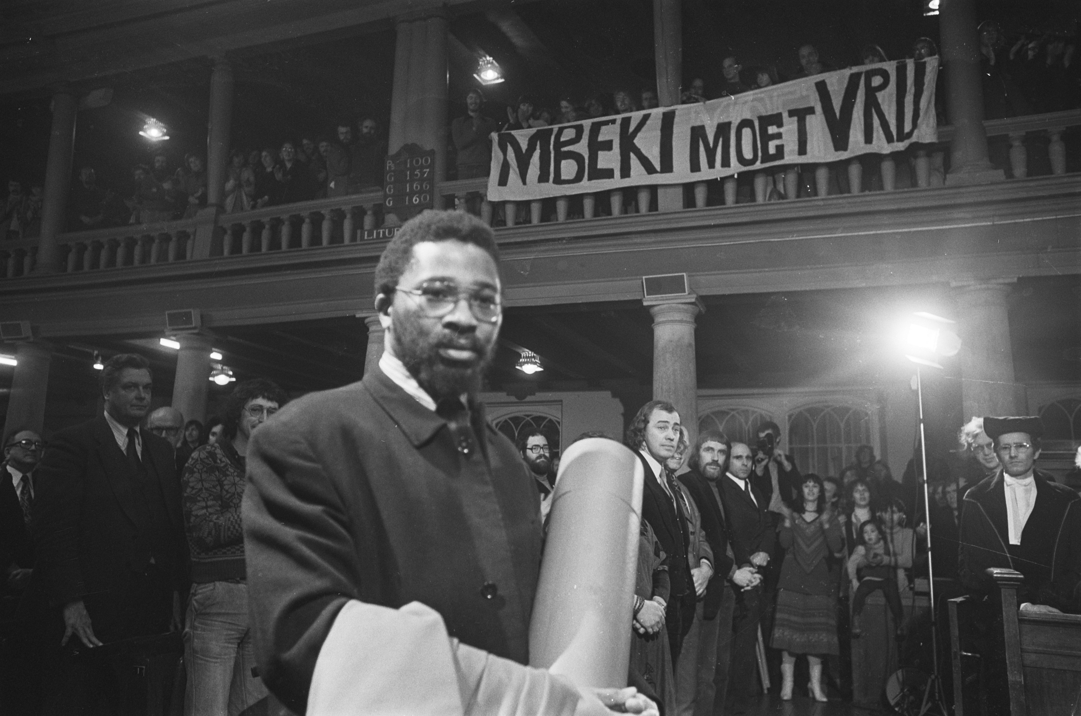 Eredoctoraat sociale wetenschappen Universiteit van Amsterdam voor in Zuid Afrika gevangen zittende vrijheidsstrijder Govan Mbeki; zoon Mbeki ontvangt onderscheiding vader